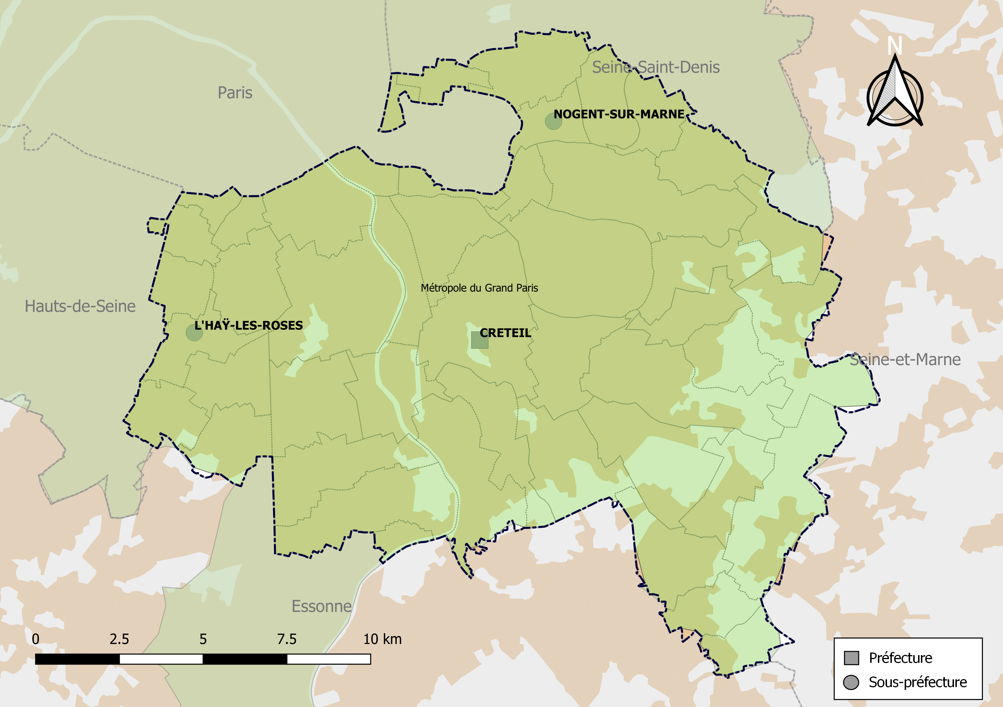 Carte des intercommunalités du département du Val-de-Marne, France. Composition au 1er janvier 2019.